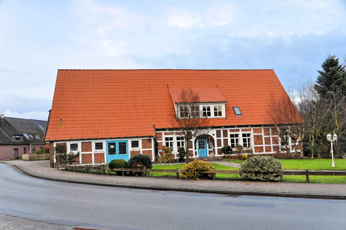 Neuenwalde 2012